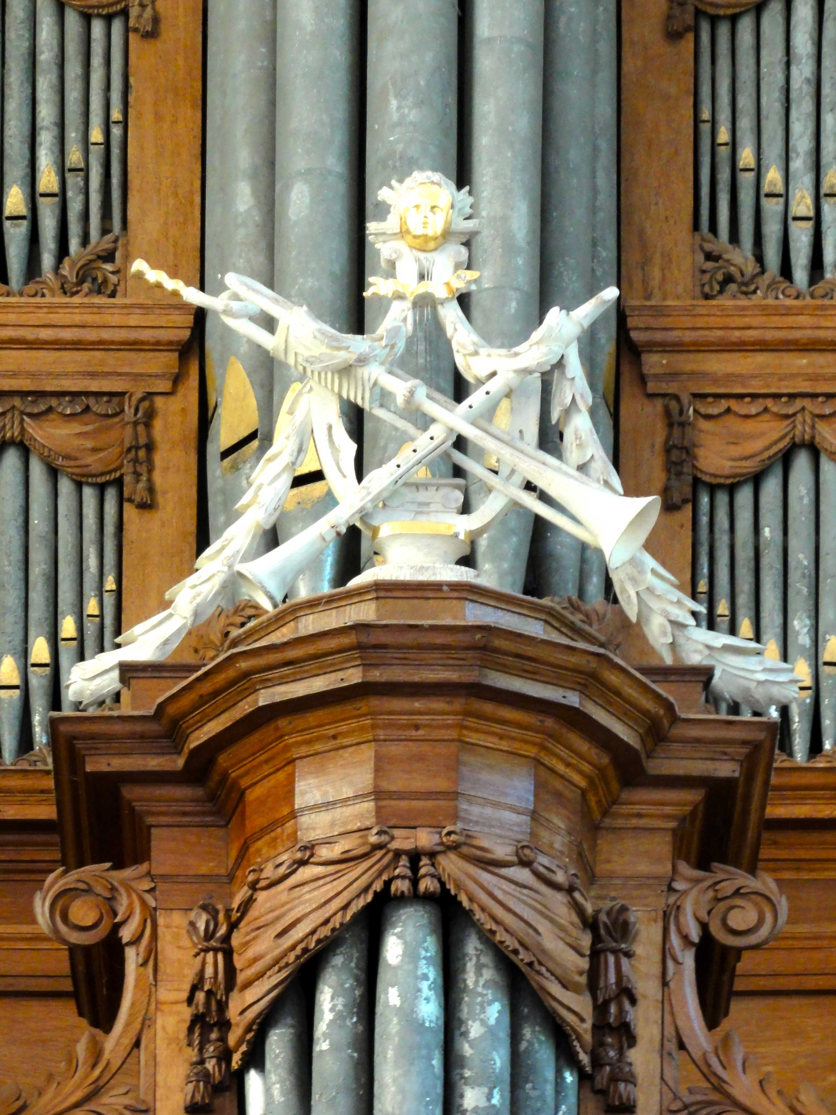 Kerk van Noordbroek met een detail van het het Arp Schnitgerorgel